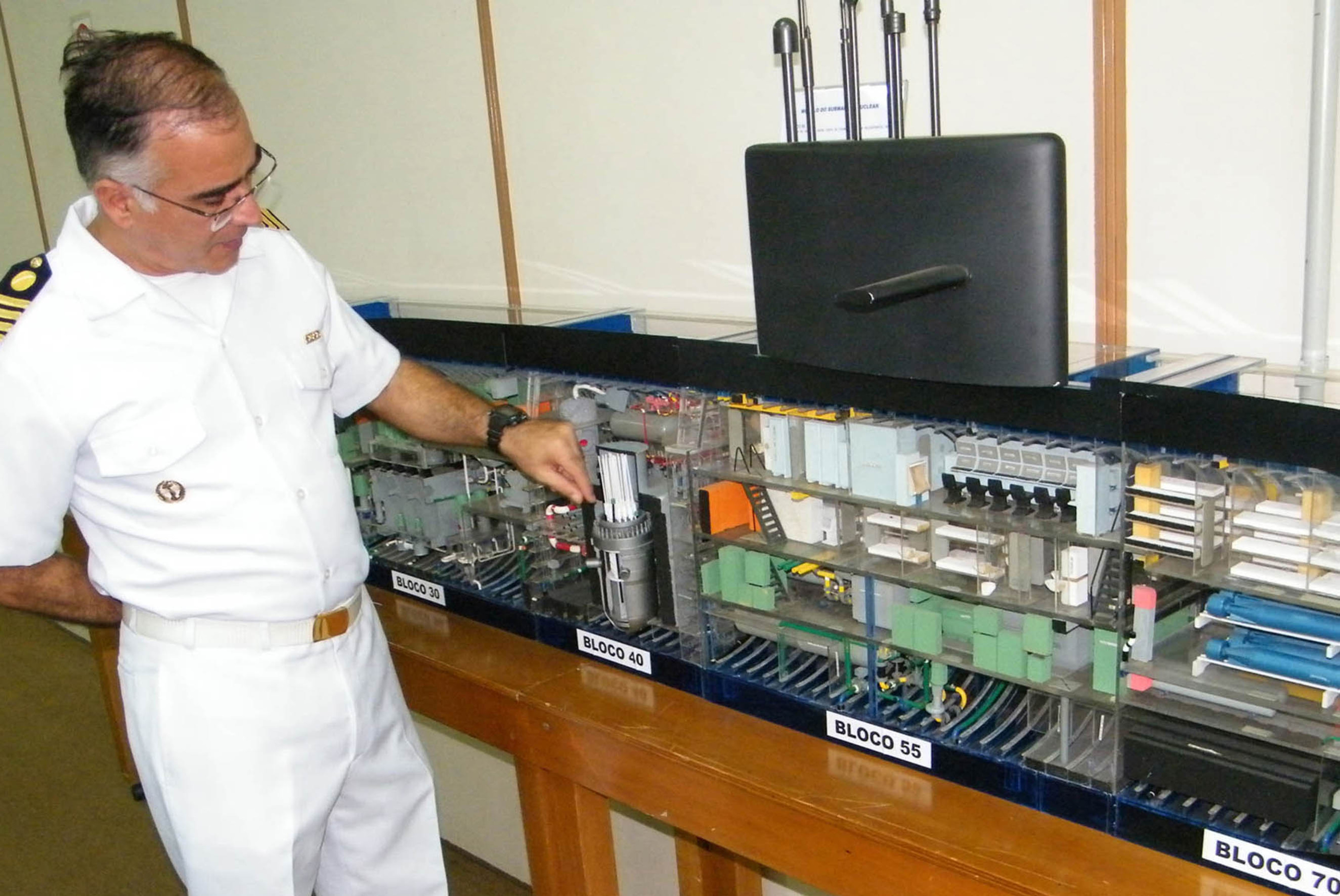 Iperó (SP) - O capitão Ferreira Marques mostra réplica do futuro submarino nuclear brasileiro (Foto reporter Vladimir Platonow / ABr)